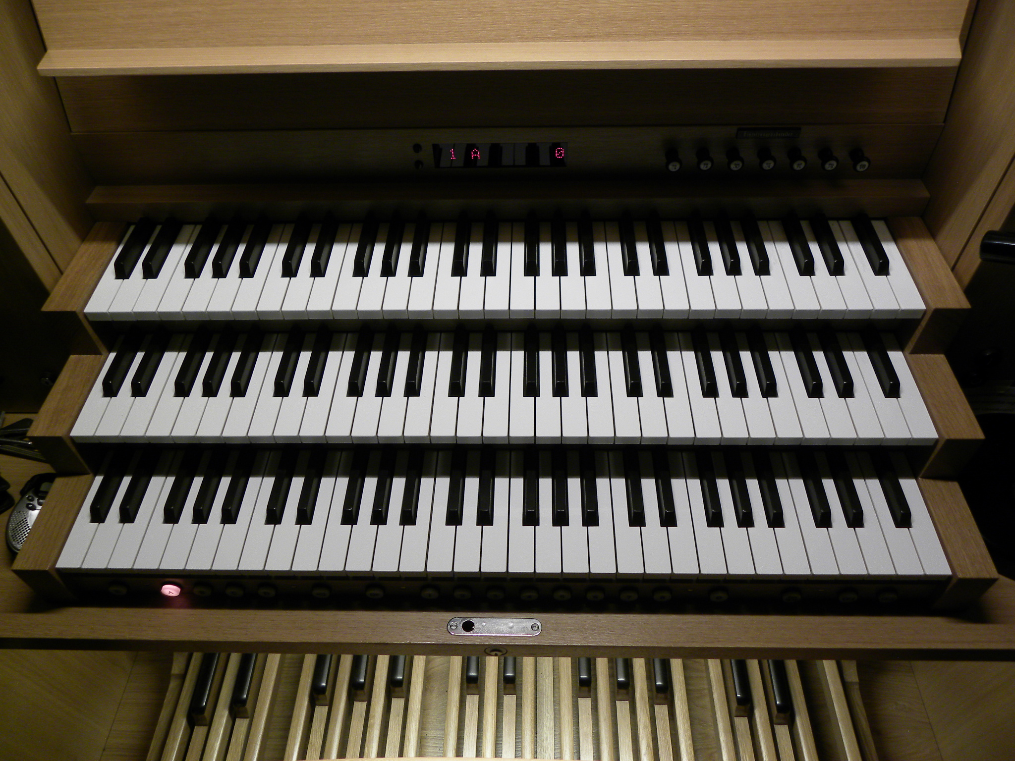 Manuały organowe (klawiatury ręczne)